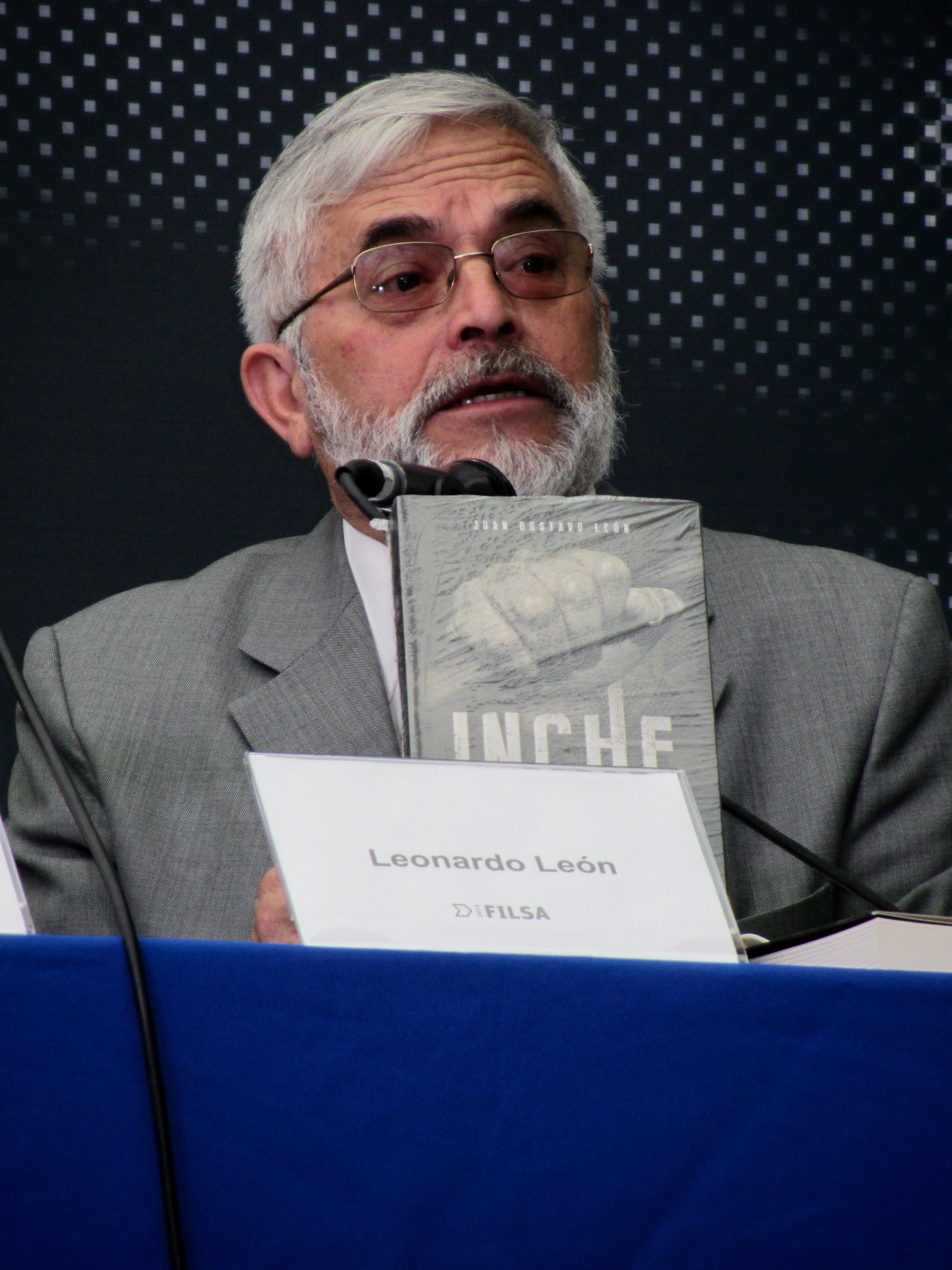 El historiador chileno Leonardo León en la Feria Internacional del Libro de Santiago 2015